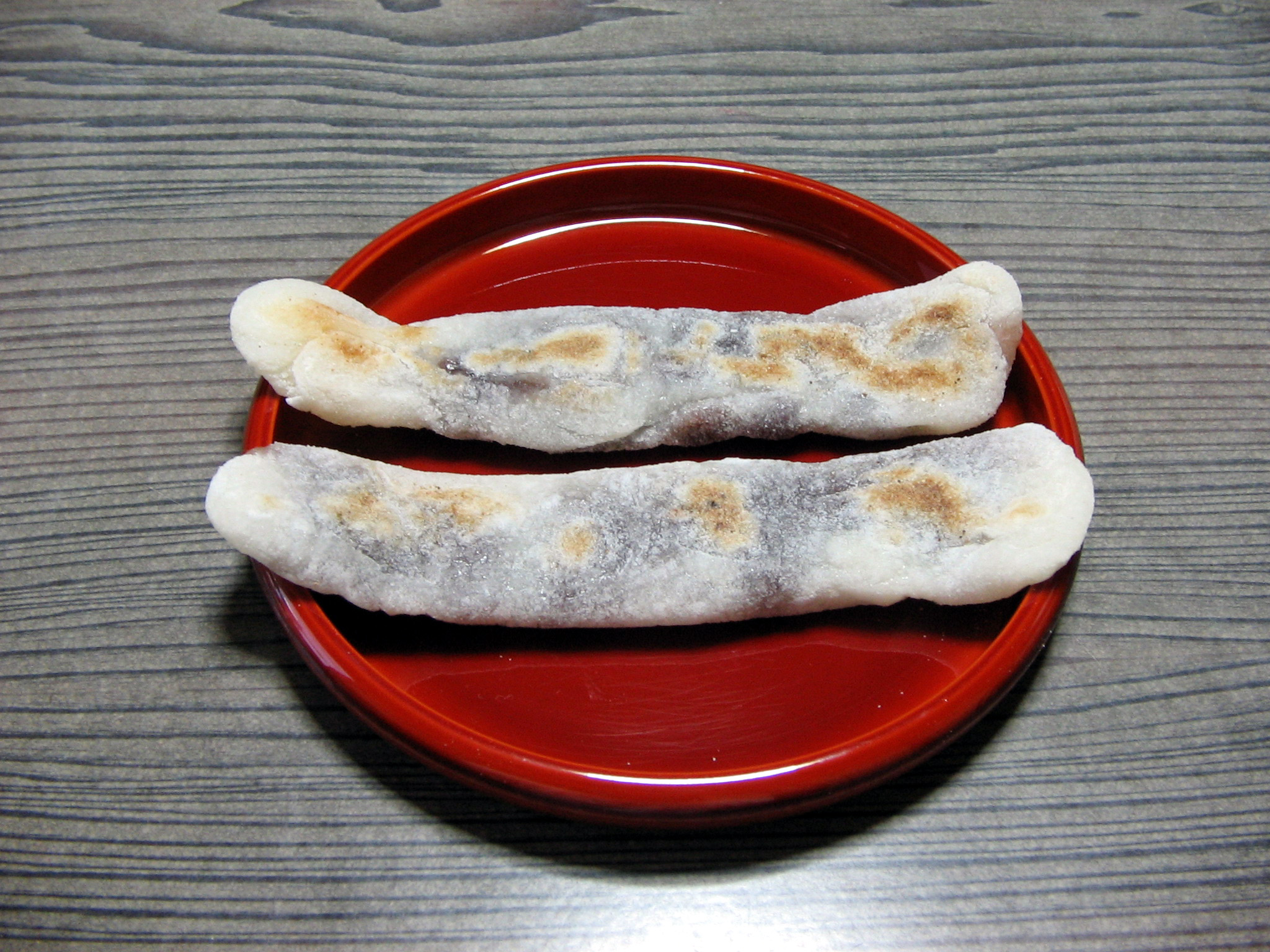 Yasunaga Mochi (A traditional rice cake at Kashiwaya in Kuwana, Mie, Japan)